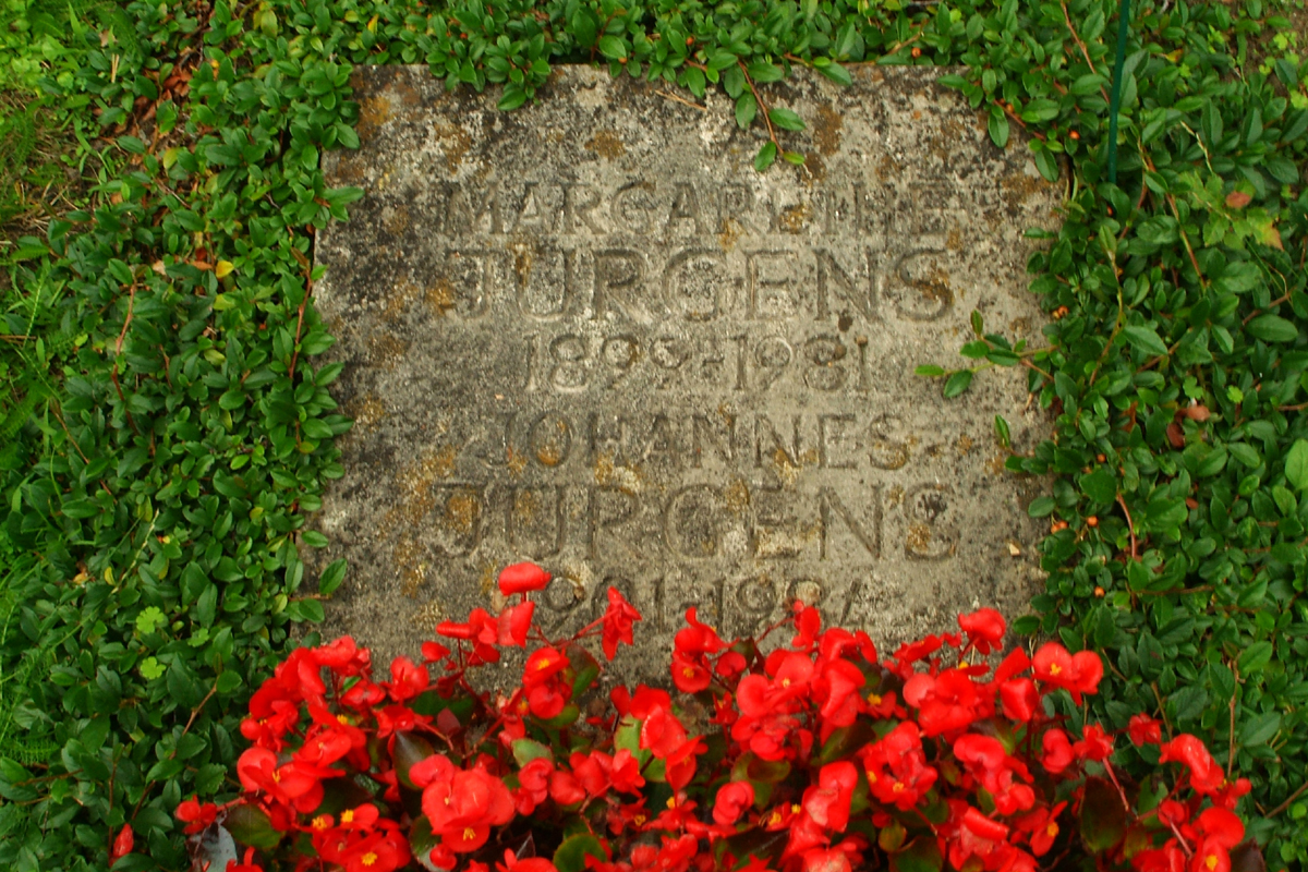 Grabstein von (Margarethe) Grethe Jürgens, Malerin der Neuen Sachlichkeit, und von Johannes Jürgens (1901-1984) auf dem Stadtfriedhof Lahe in Hannover ...